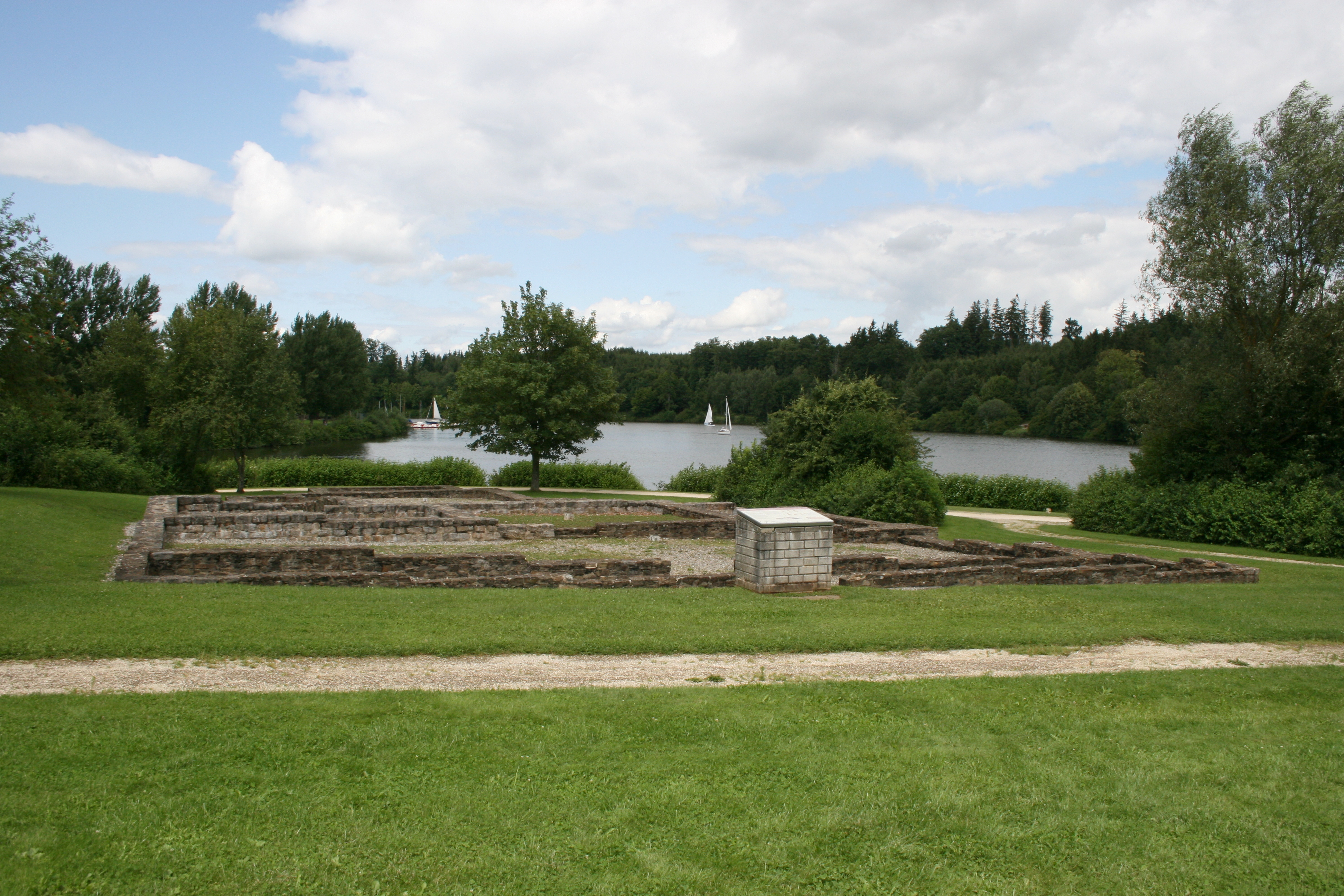 Ansicht des Kastelbades am Kastell Buch.